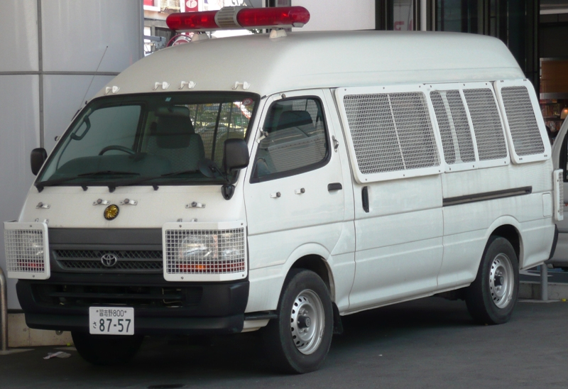 千葉県警の小型輸送車。